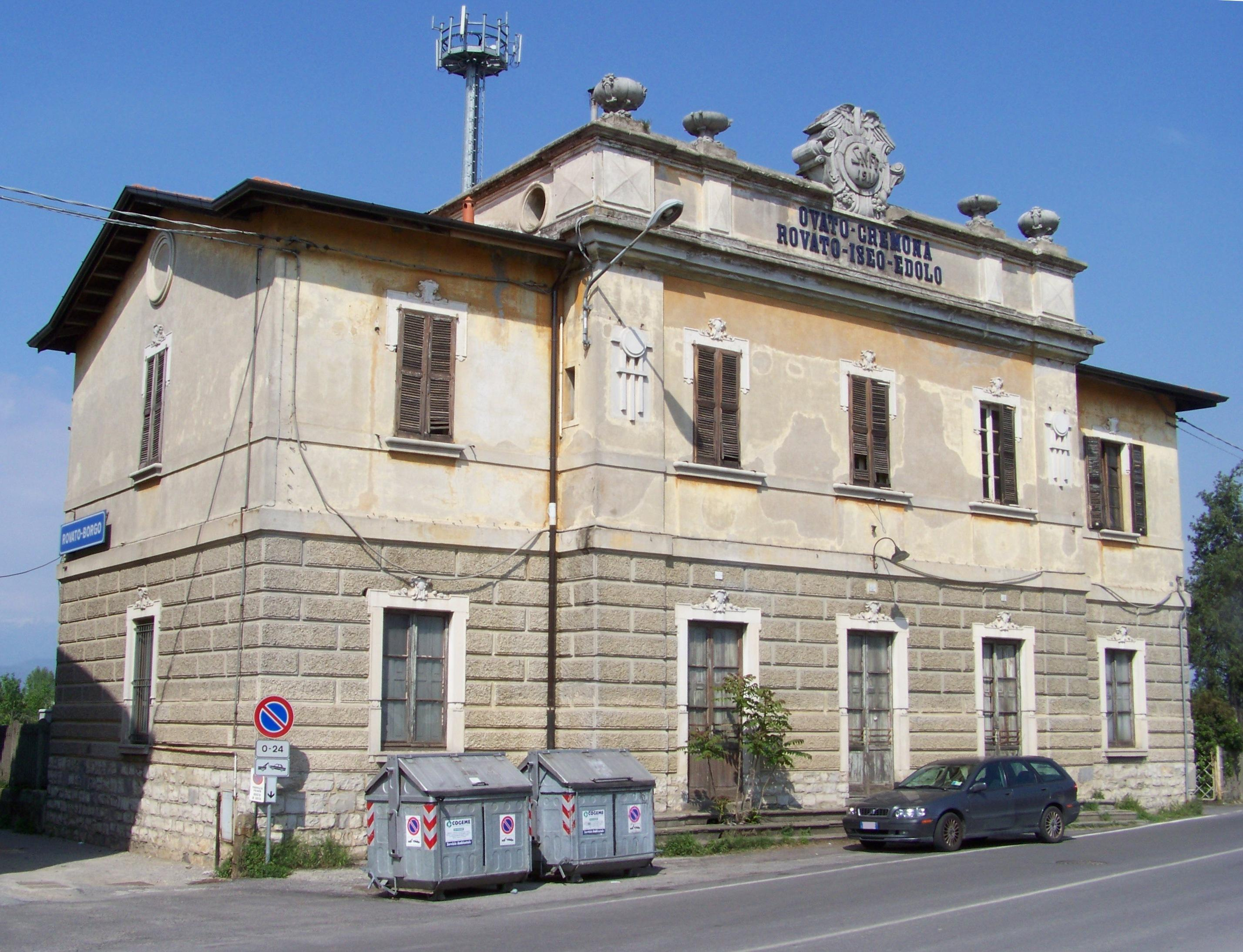 Stazione di Rovato Borgo - Lato campagna